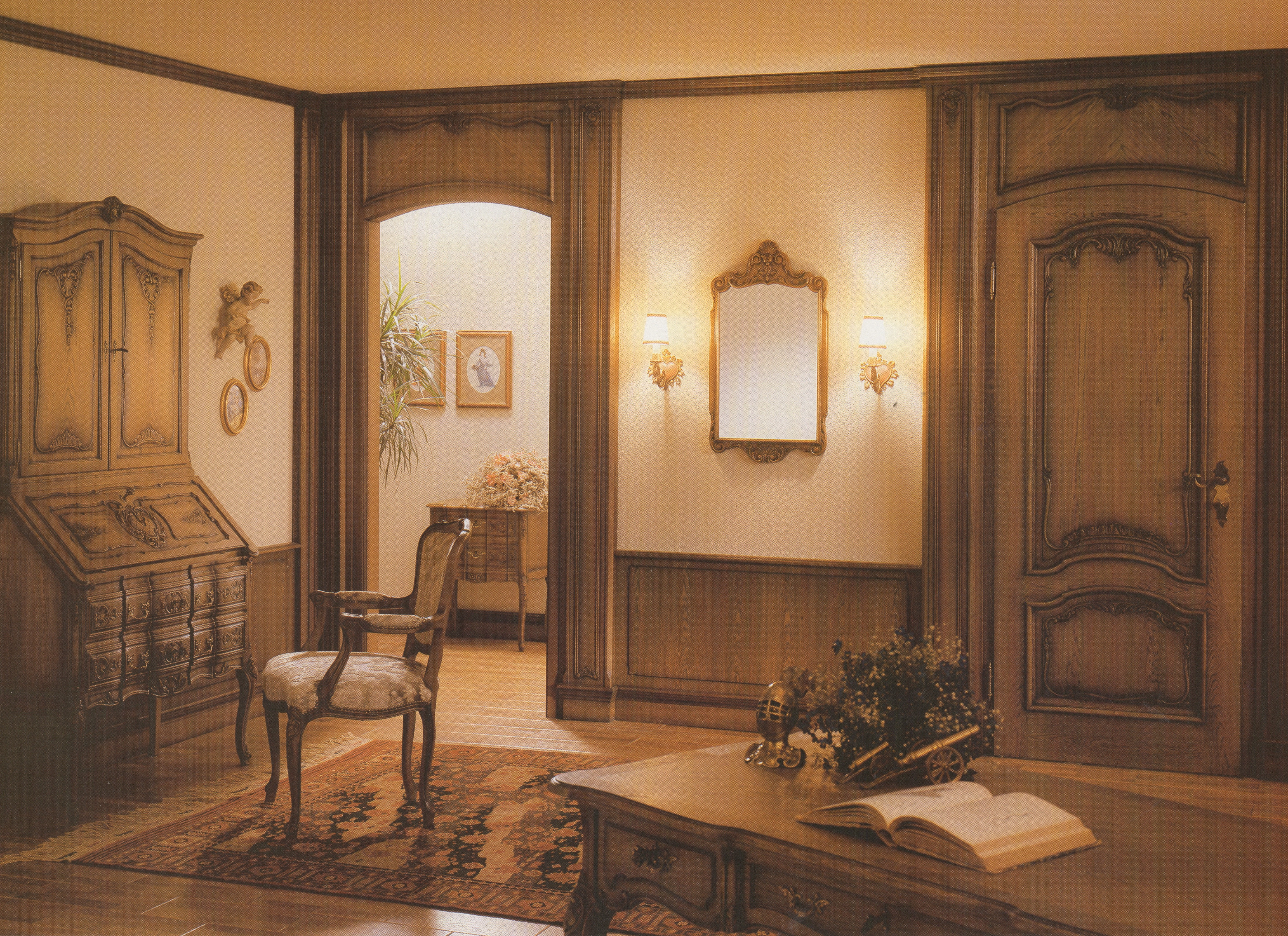 Katalogabbildung 1980, Dielen-Innenausbauelemente und Einzelmöbel Einrichtungsbeispiel 261: Vertäfelungen, Durchgangsverkleidung und Zimmertür, Sekretär „Luxemburg“ mit Aufsatz, Armlehnstuhl „Kufstein“, Spiegel „Maas“, Schreibtisch „Givet“, Kommode „Mecheln“ in Aachen-Lütticher Barock; Stilmöbelfabrik Anton Spilker, Steinheim (Westfalen)